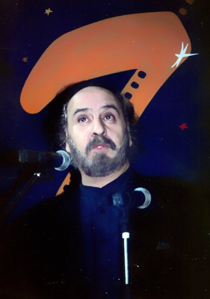 El director de cine chileno Miguel Littín durante la presentación de la película Los náufragos en el Festival Internacional de Cine de Viña del Mar, 1994